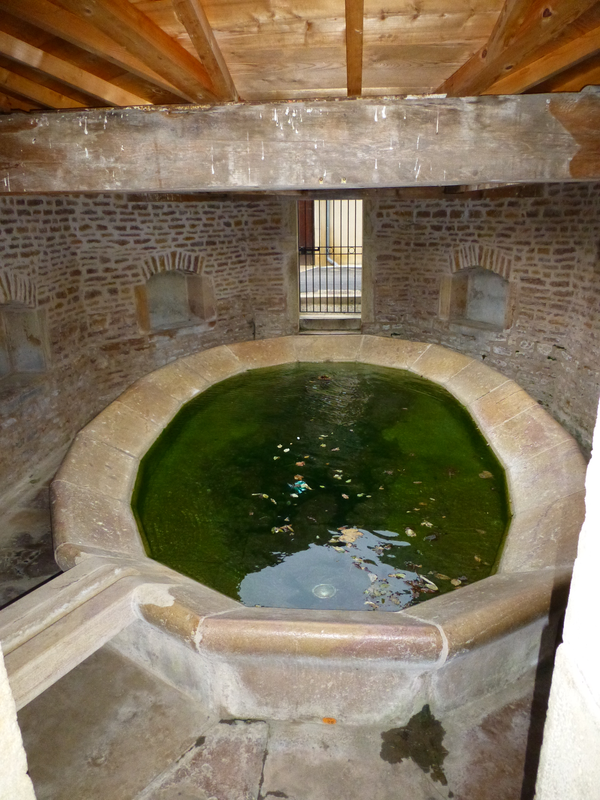 Lavoir de Bissy-sous-Uxelles (71)